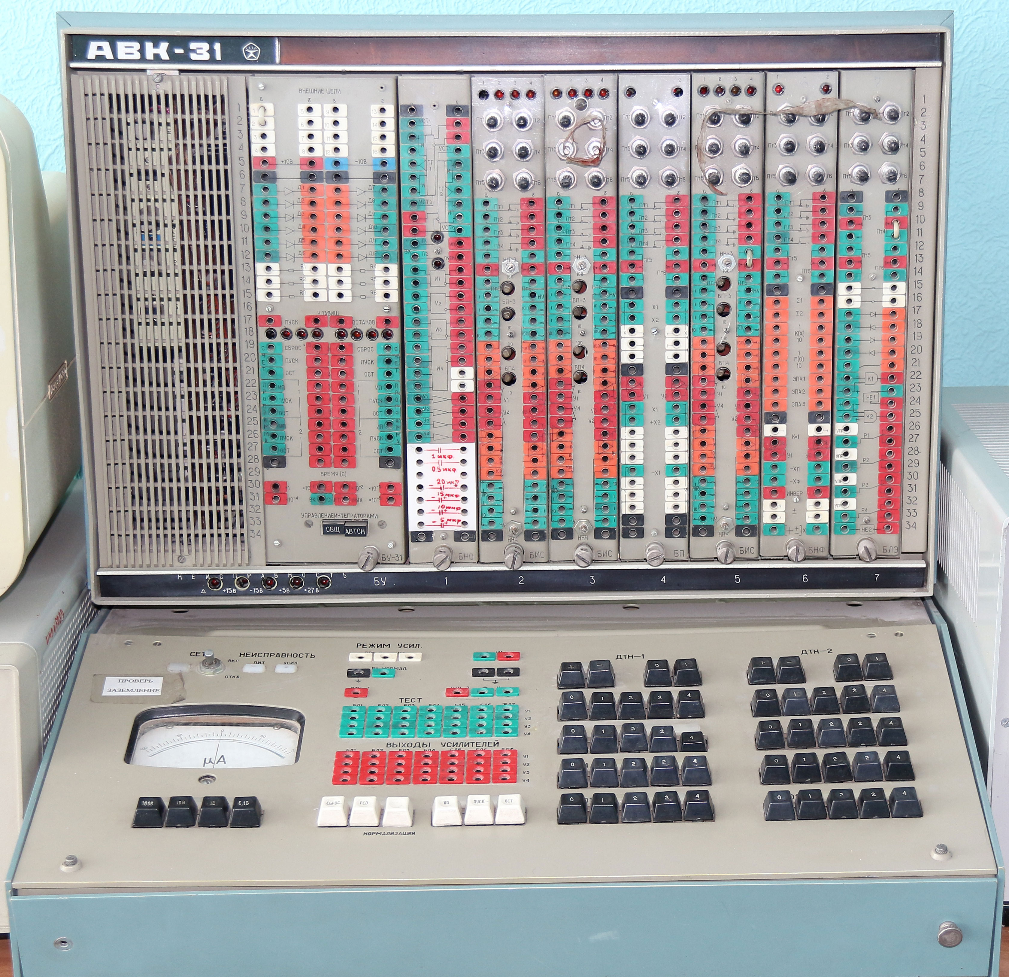 АВК-31